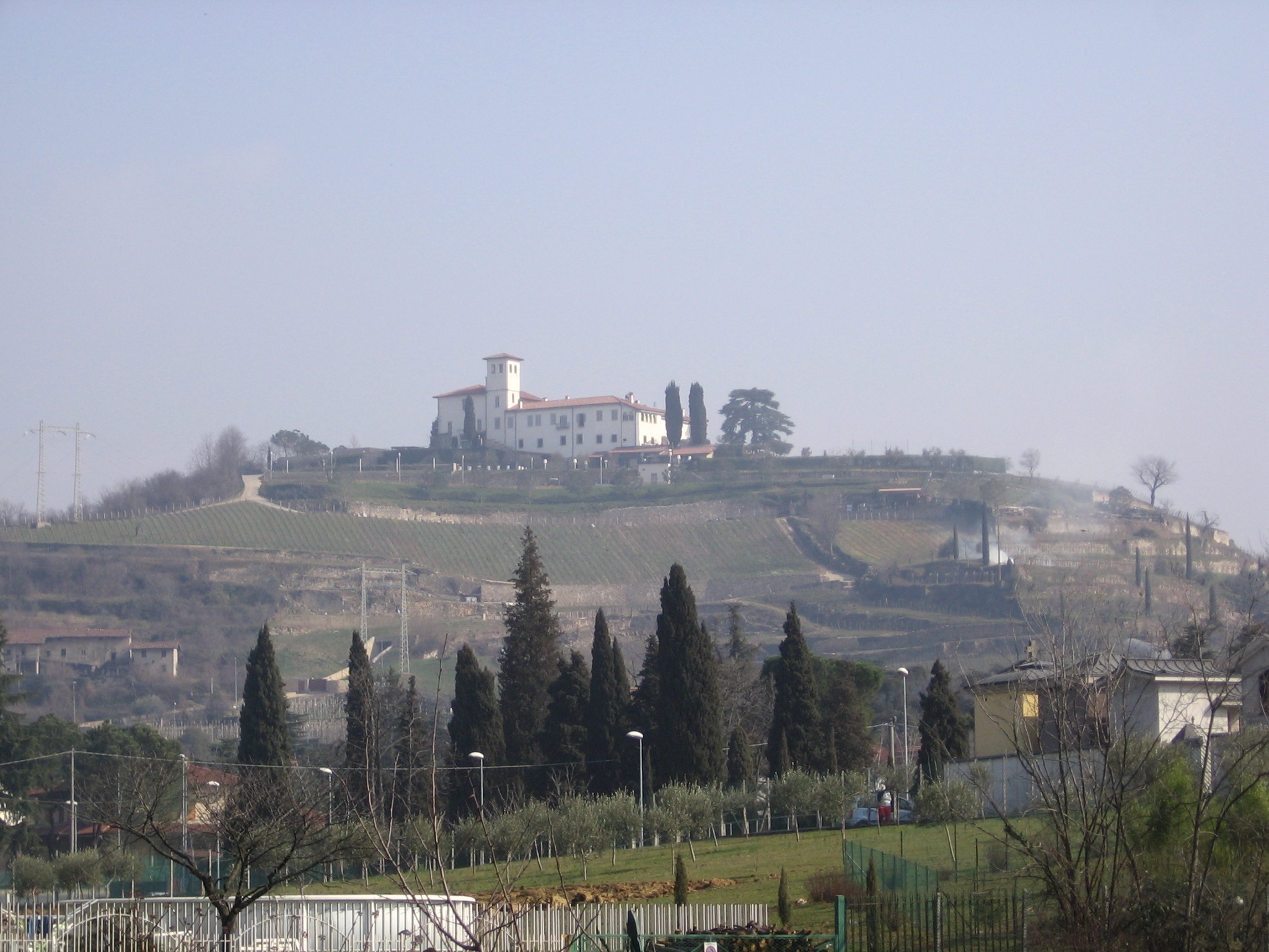 Carobbio degli Angeli, Bergamo, Italy